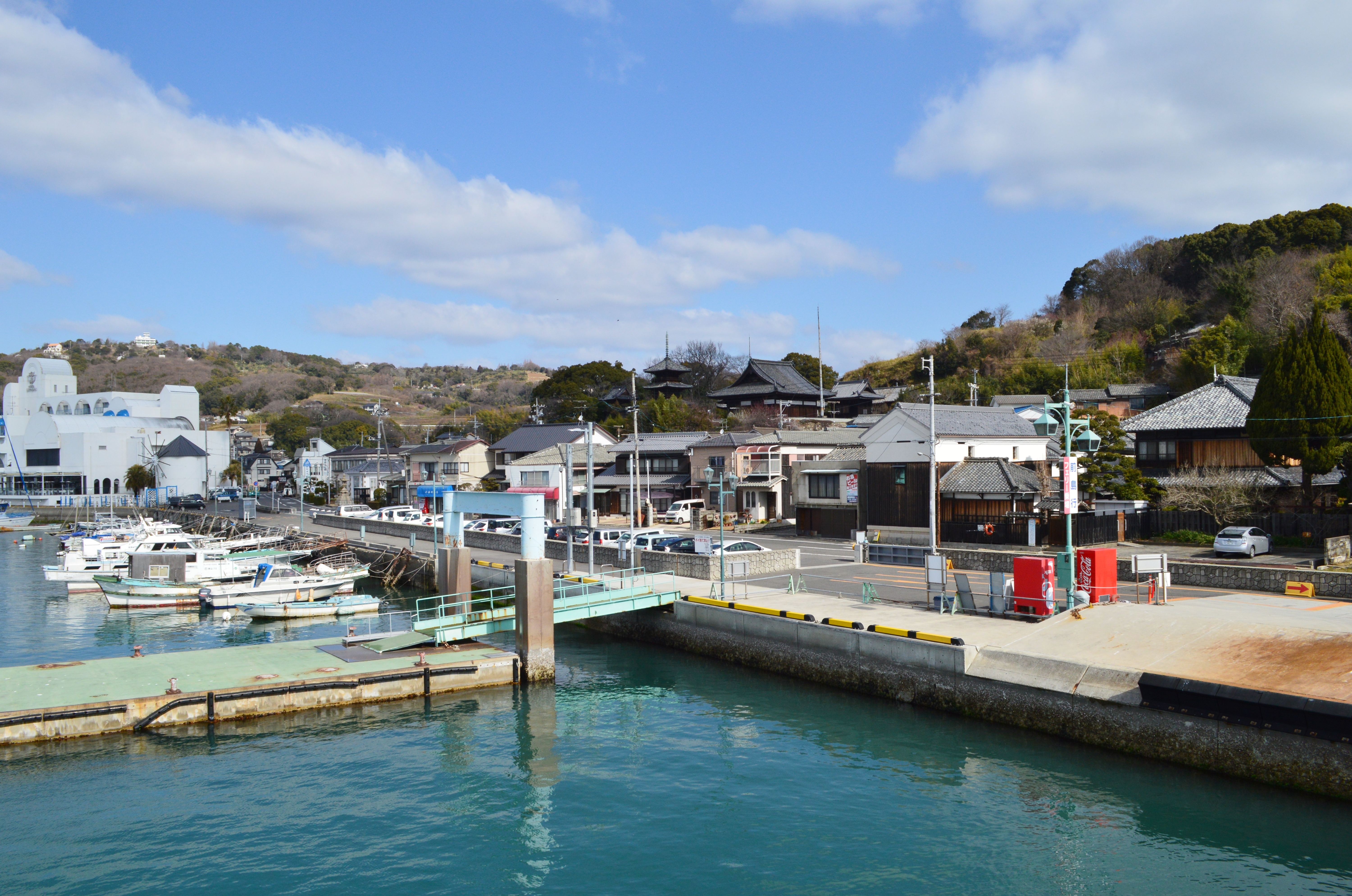 前島フェリー 牛窓埠頭